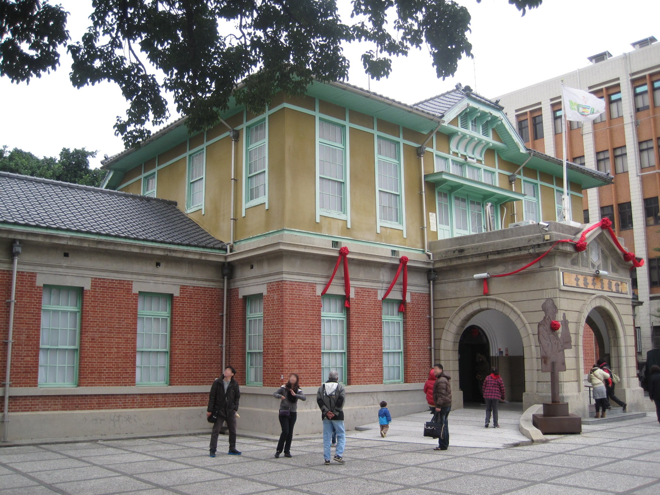 虎尾郡役所，現為布袋戲館